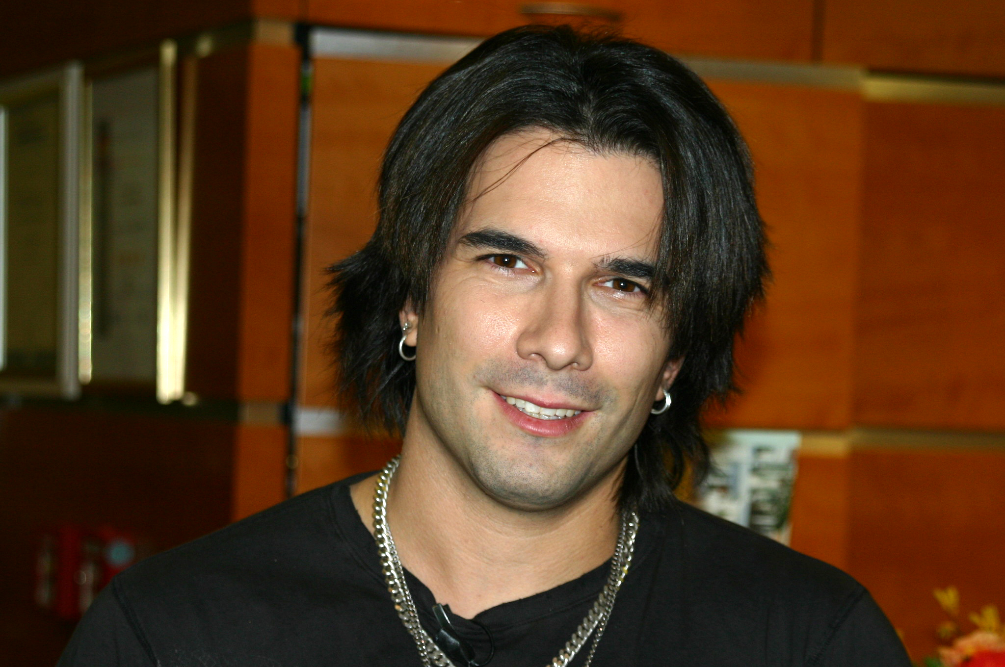 ... Sonstiges